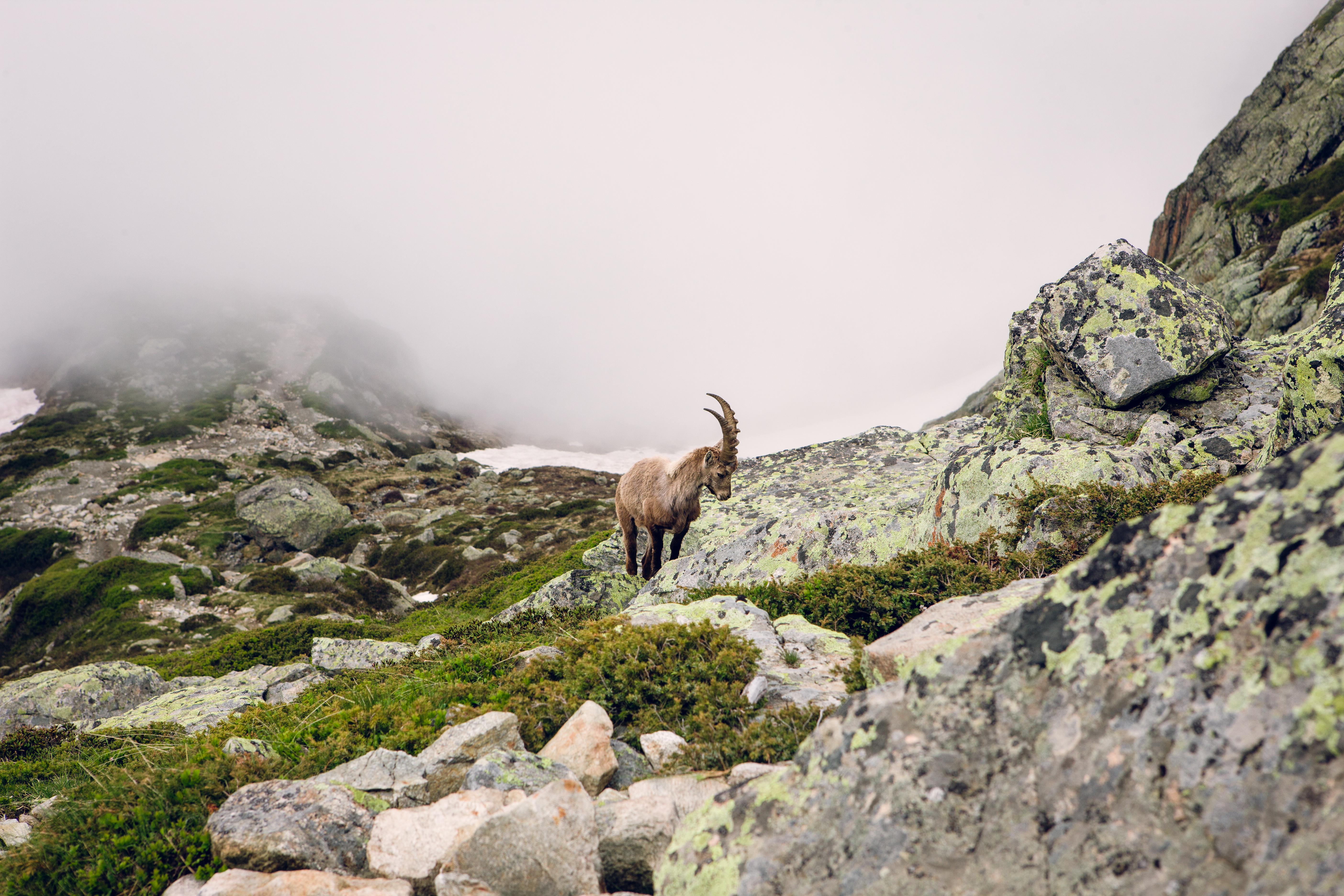 Un bouquetin dans les Aiguilles Rouges